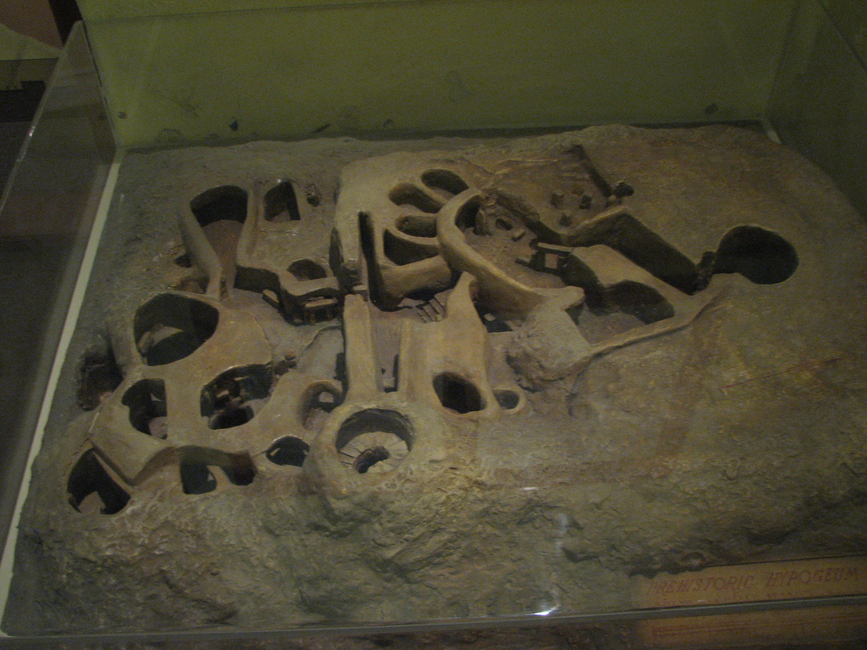 Maketa hipogeja Hal Saflieni v Paoli (Malta). Maketa je razstavljena v Arheološkem muzeju v Valletti.